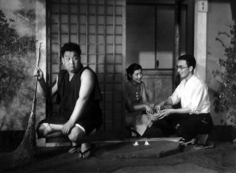 『入婿合戦』、1936年、スチル写真